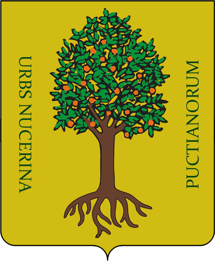 Riadattazione dello stemma dell'antica università di Nocera Pucciano, realizzato seguendo le ricerche storiche usate anche dalle associazioni rievocative del territorio. La riproduzione è approssimata ed ha un puro fine informativo e didattico.